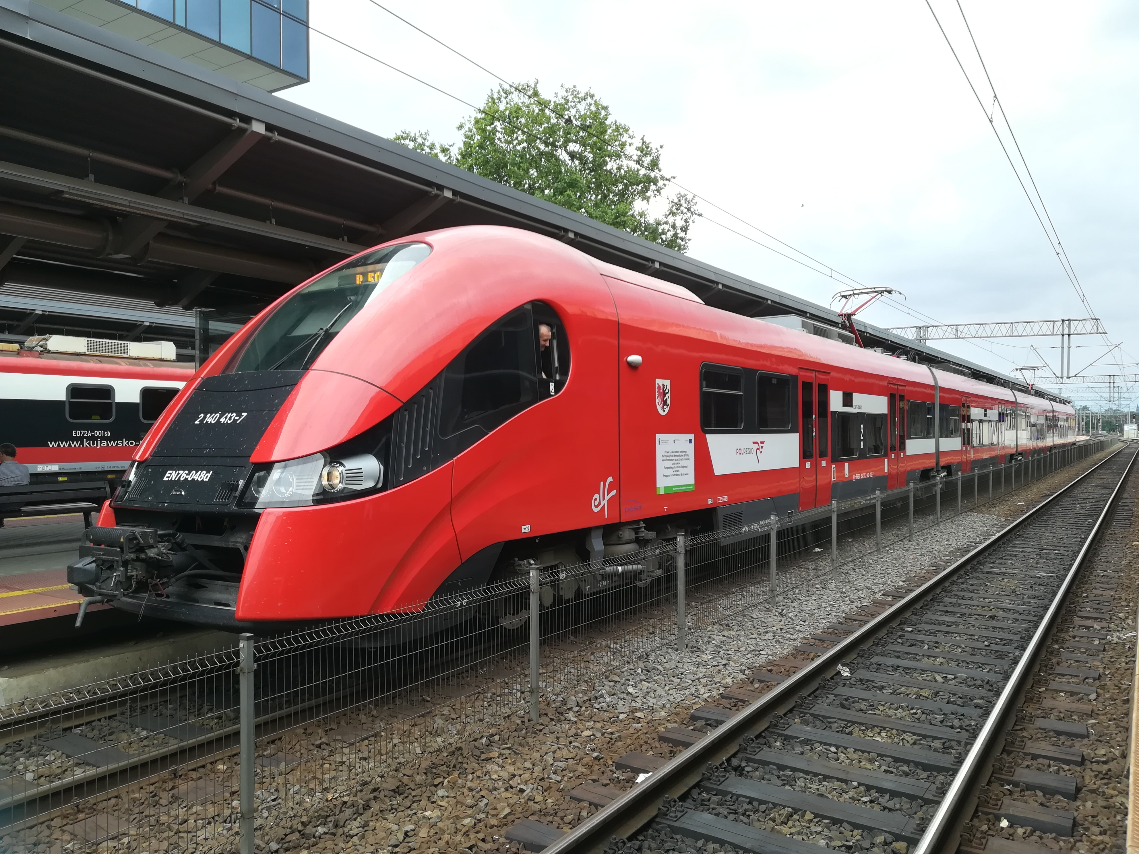 EN76-048 w Bydgoszczy Gł.